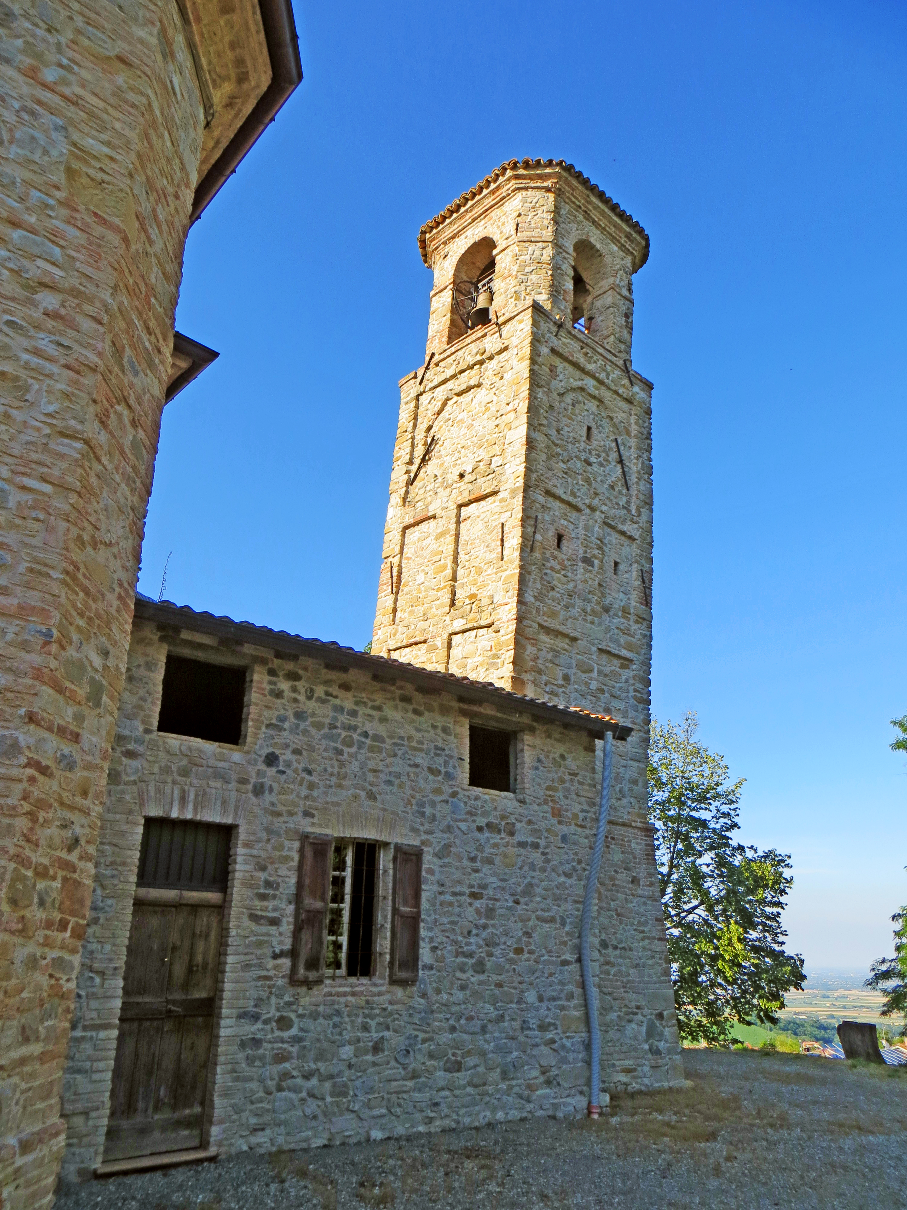 Pieve di Sant'Antonino Martire (Barbiano, Felino) - canonica e campanile